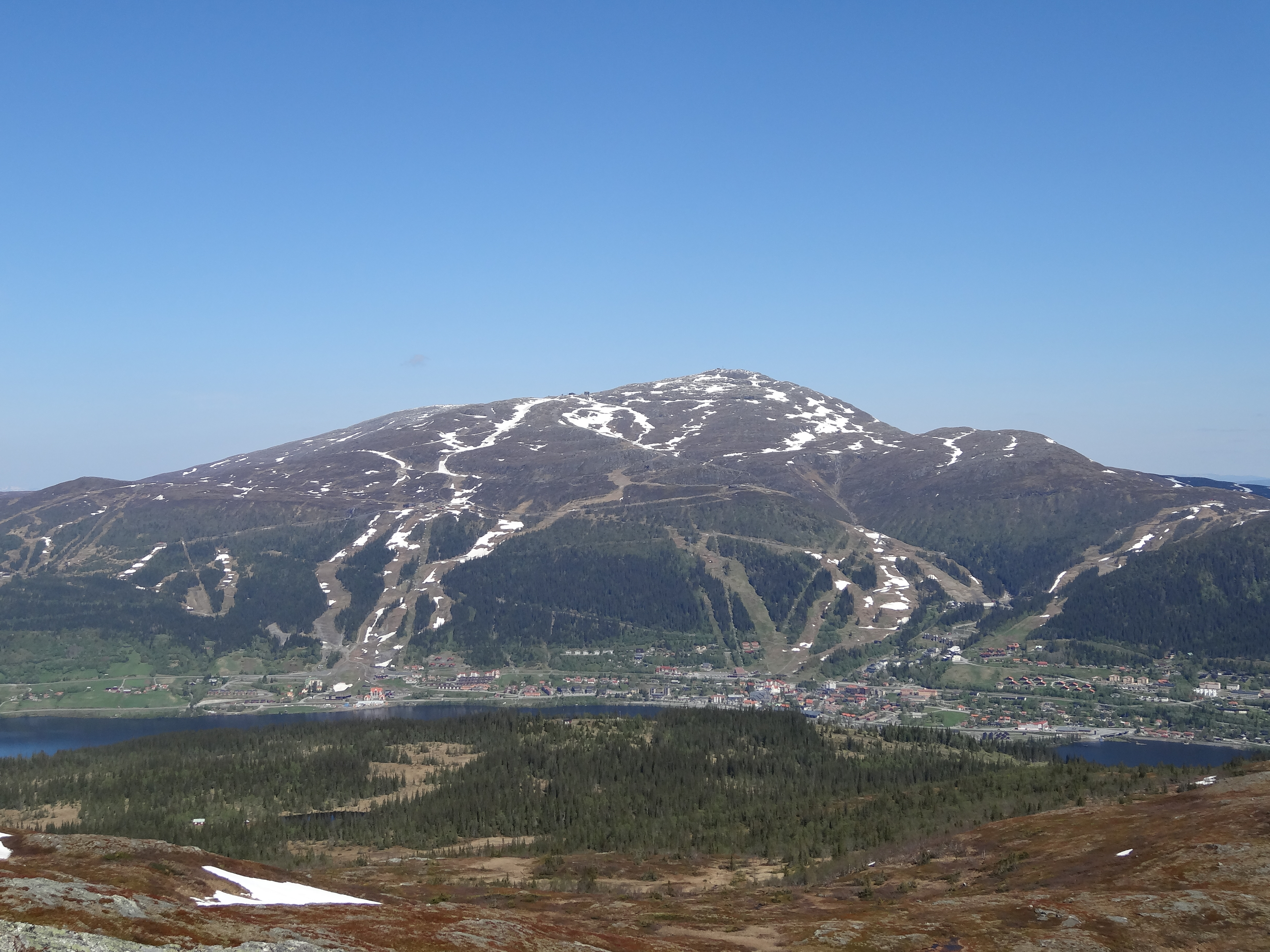 Åreskutan, bilden tagen från Renfjället